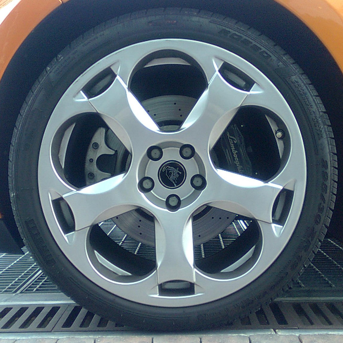 Cerchi in lega Lamborghini Gallardo con Pneumatici Pirelli